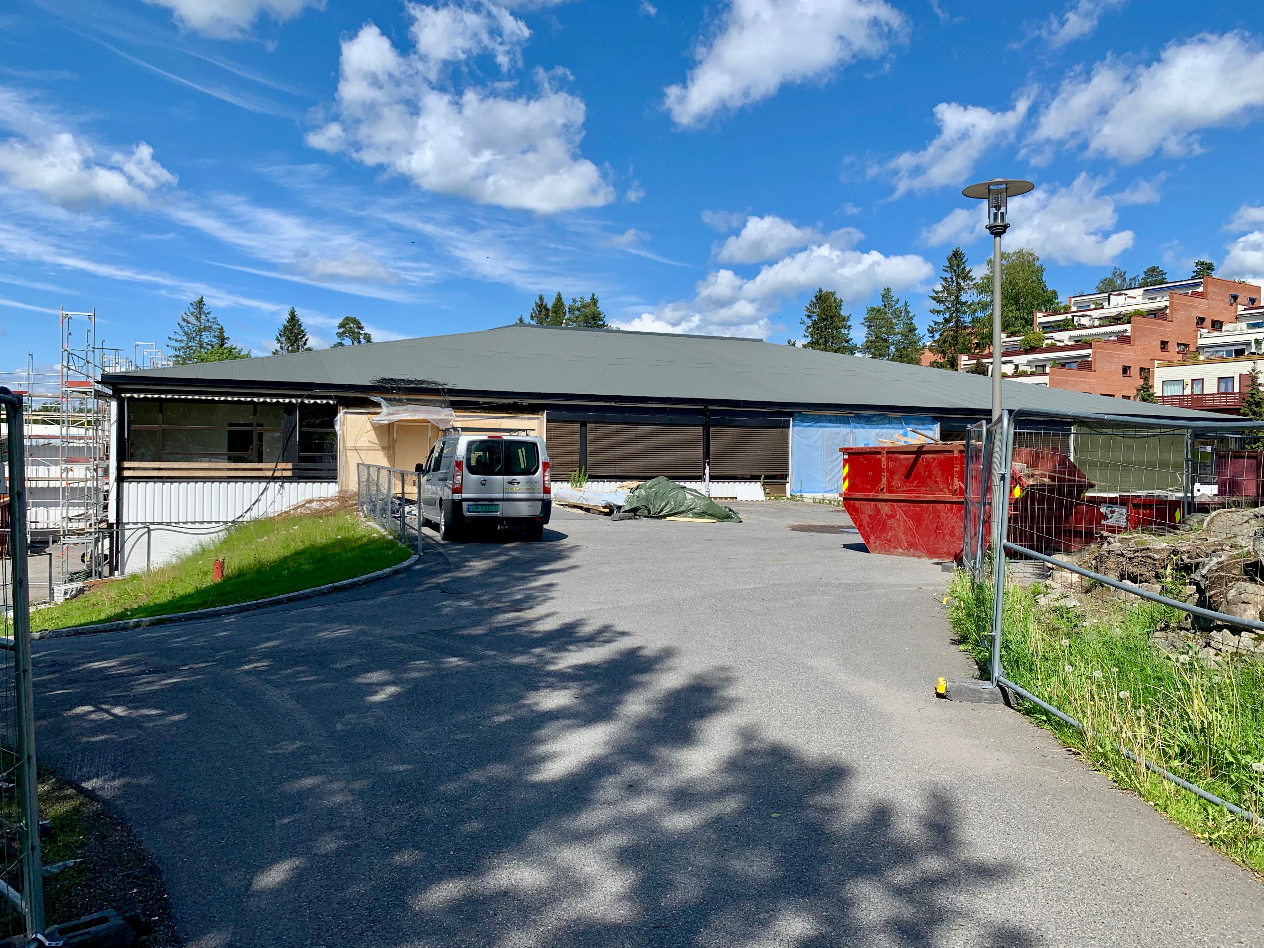 Kurland skole i Lørenskog, under oppussing sommeren 2019.